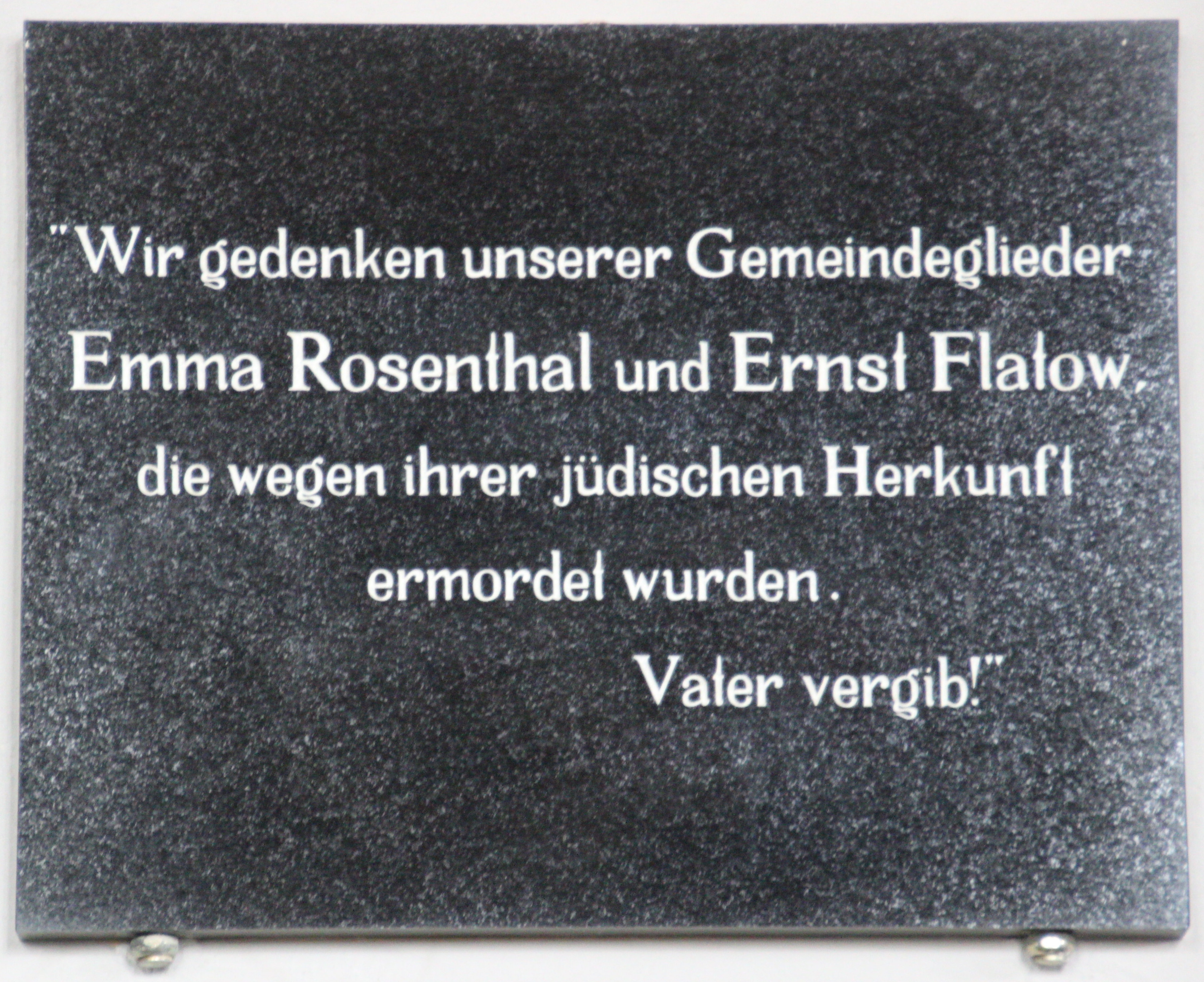 Dorfkirche Hohen Neuendorf Gedenktafel für Ernst Flatow und Emma Rosenthal